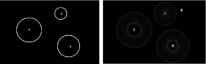 Cercles_TH